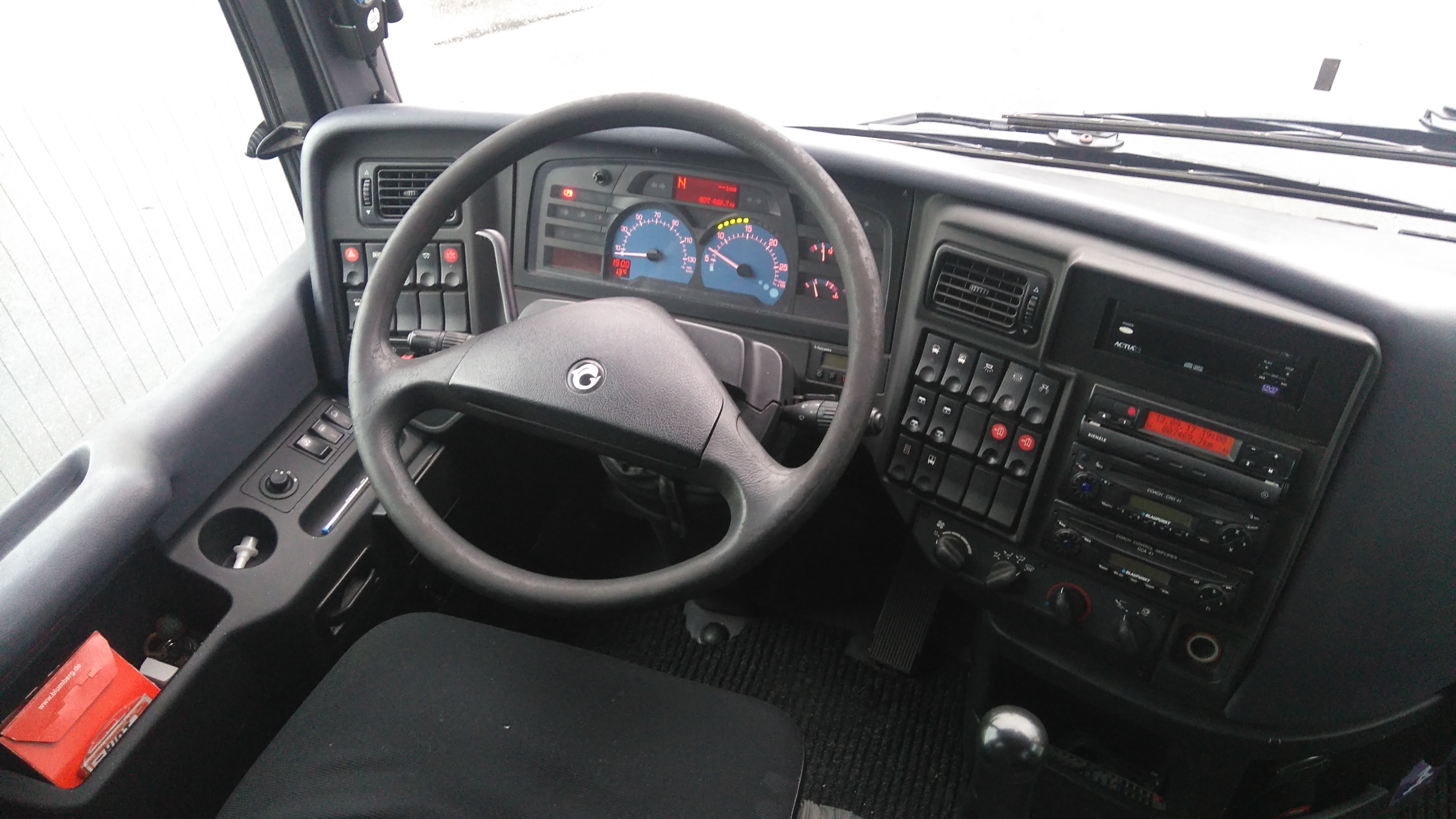 Irisbus Iliade - Poste de conduite